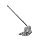 PD mop - usual admin-sign